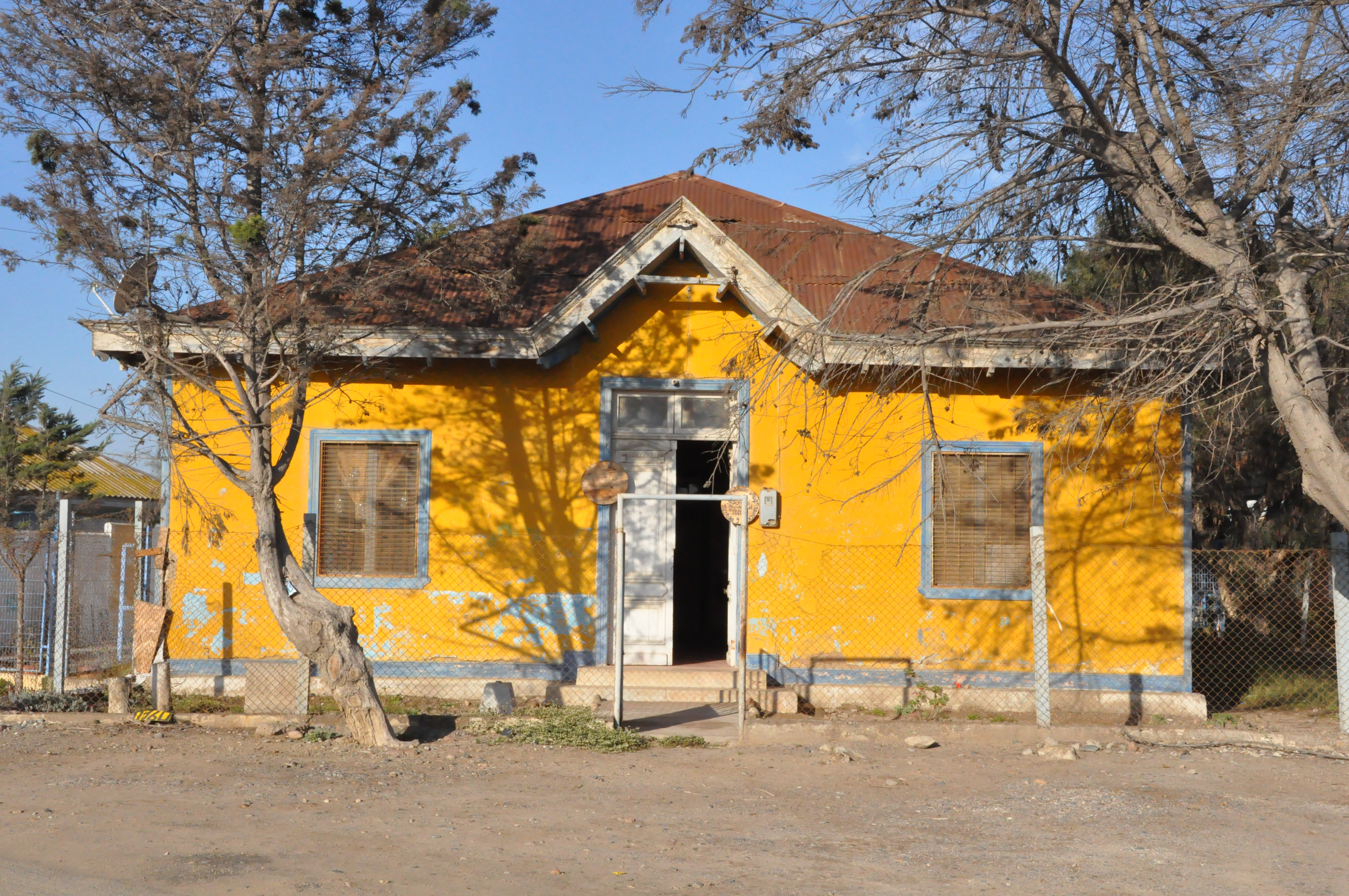 Edificios antiguos en localidad de Hacienda Nicolasa Valle del Huasco Chile